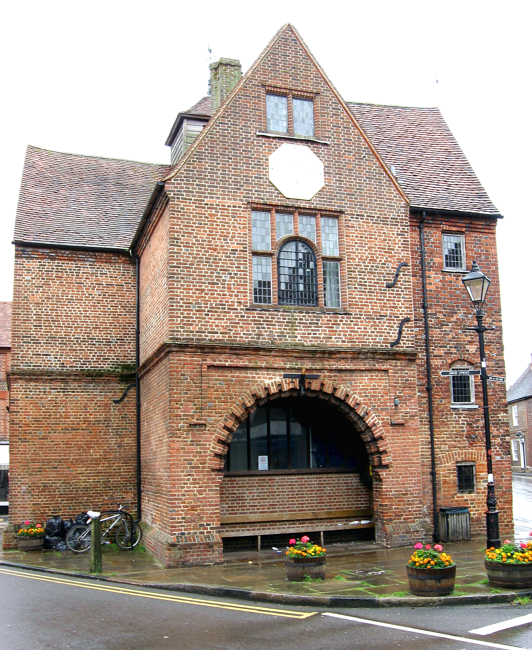 Budova radnice ve Watlingtonu